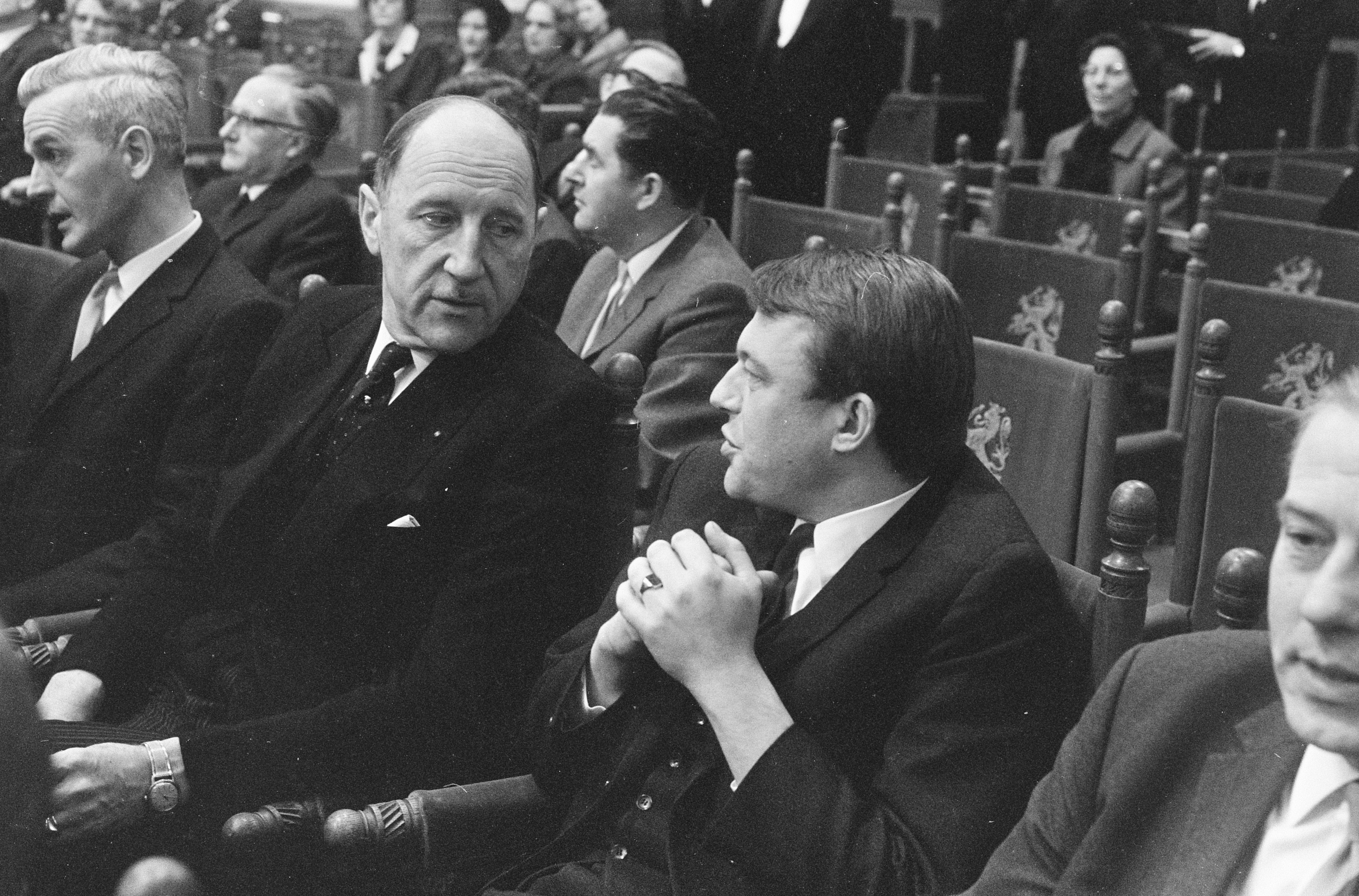 Collectie / Archief : Fotocollectie Anefo Reportage / Serie : [ onbekend ] Beschrijving : Opening Staten-Generaal, tijdens plechtigheid Minister Luns en mr. Hans van Mierlo naast elkaar Datum : 23 februari 1967 Locatie : Den Haag, Zuid-Holland Trefwoorden : ministers, politici, politiek, prinsjesdagen Persoonsnaam : Luns, J.A.M.H., Luns, Joseph, Mierlo, H.A.F.M.O. van Fotograaf : Koch, Eric / Anefo Auteursrechthebbende : Nationaal Archief Materiaalsoort : Negatief (zwart/wit) Nummer archiefinventaris : bekijk toegang 2.24.01.05 Bestanddeelnummer : 920-1030